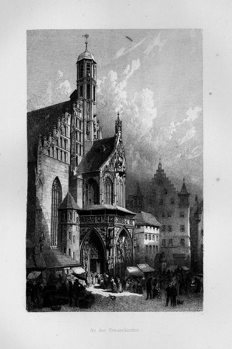 An der Frauenkirche aus Lorenz Ritter: Malerische Ansichten aus Nürnberg, Berlin, Wasmuth, 1876